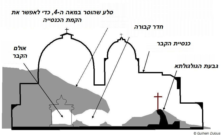 Le site de la tombe du Christ.